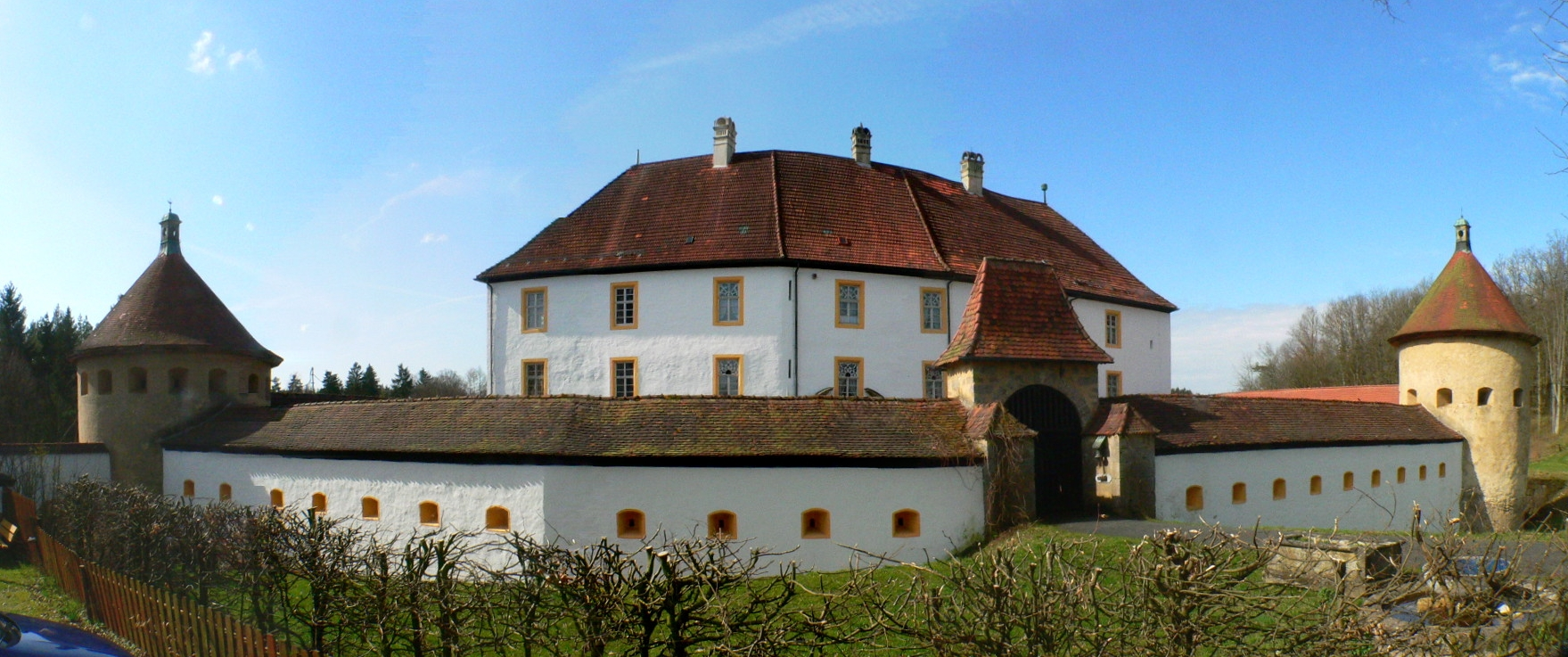 Schloss Freienfels, Hollfeld, Fränkische Schweiz